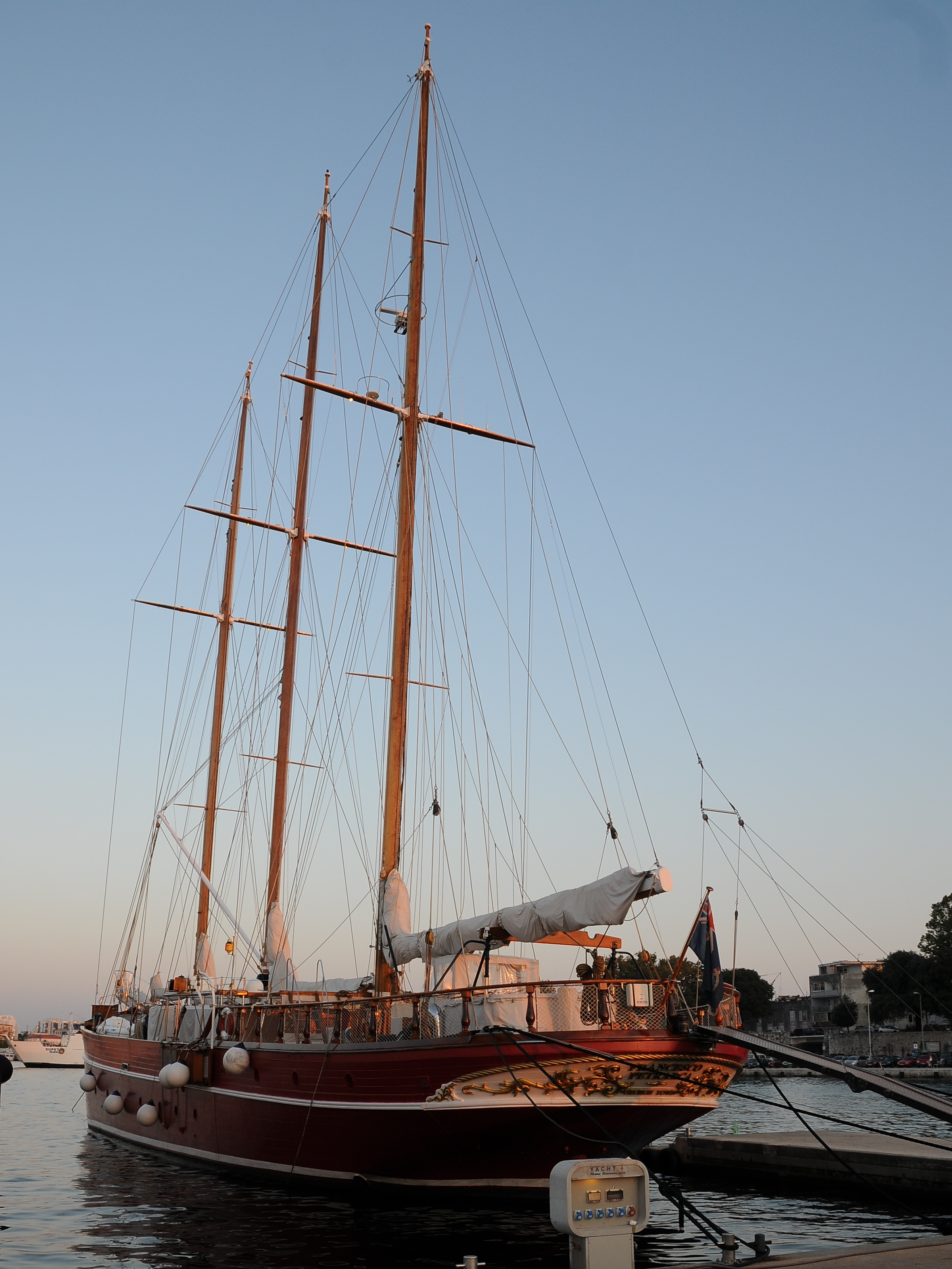 Im Hafen von Zadar (Kroatien). Der Begriff Segelyacht (auch Segeljacht) bezeichnet ein Segelschiff, das hauptsächlich für Freizeit- oder Sportaktivitäten verwendet wird oder gelegentlich auch repräsentativen Zwecken dient.